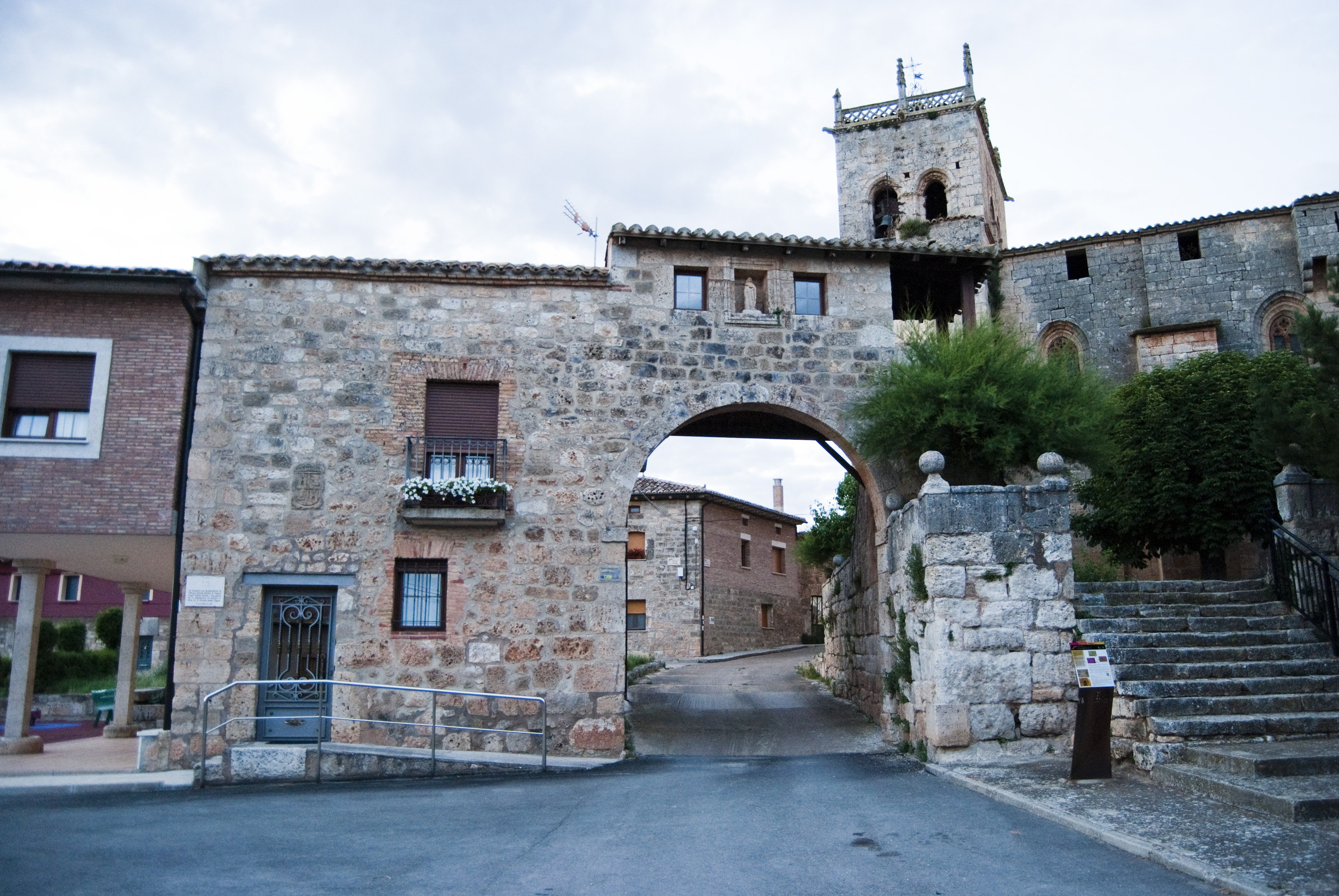 Conjuradero de Villegas. Burgos. España.